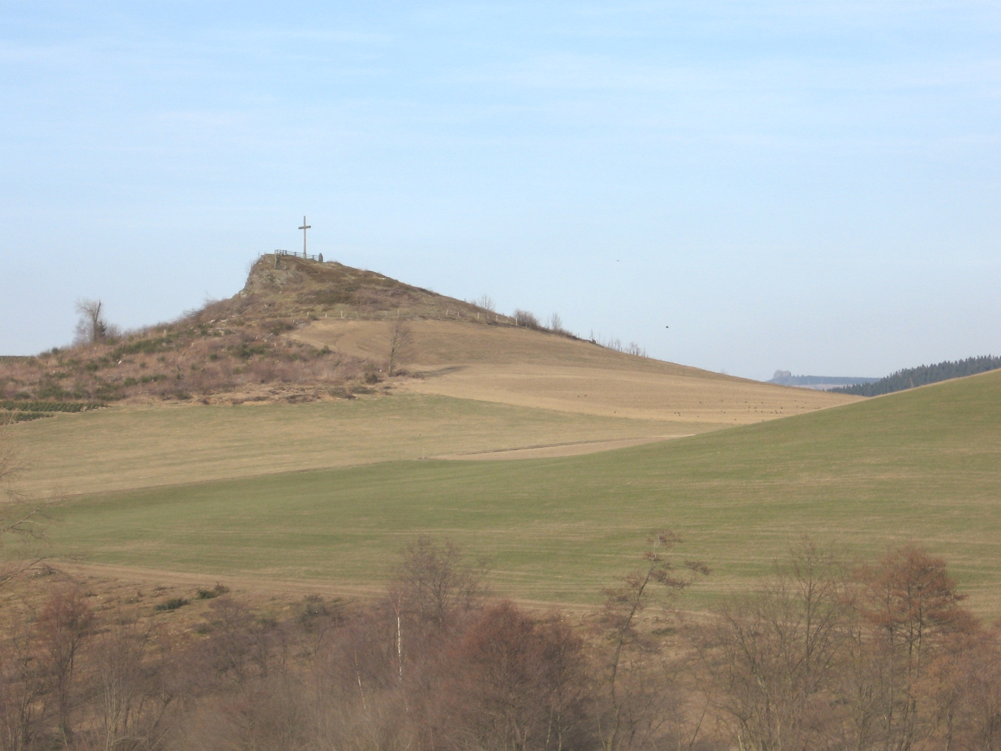 ND Krähenstein westlich von Winterberg-Siedlinghausen, rechts neben dem Fels ist in der Ferne der Feldstein der Bruchhauser Steine zu sehen.